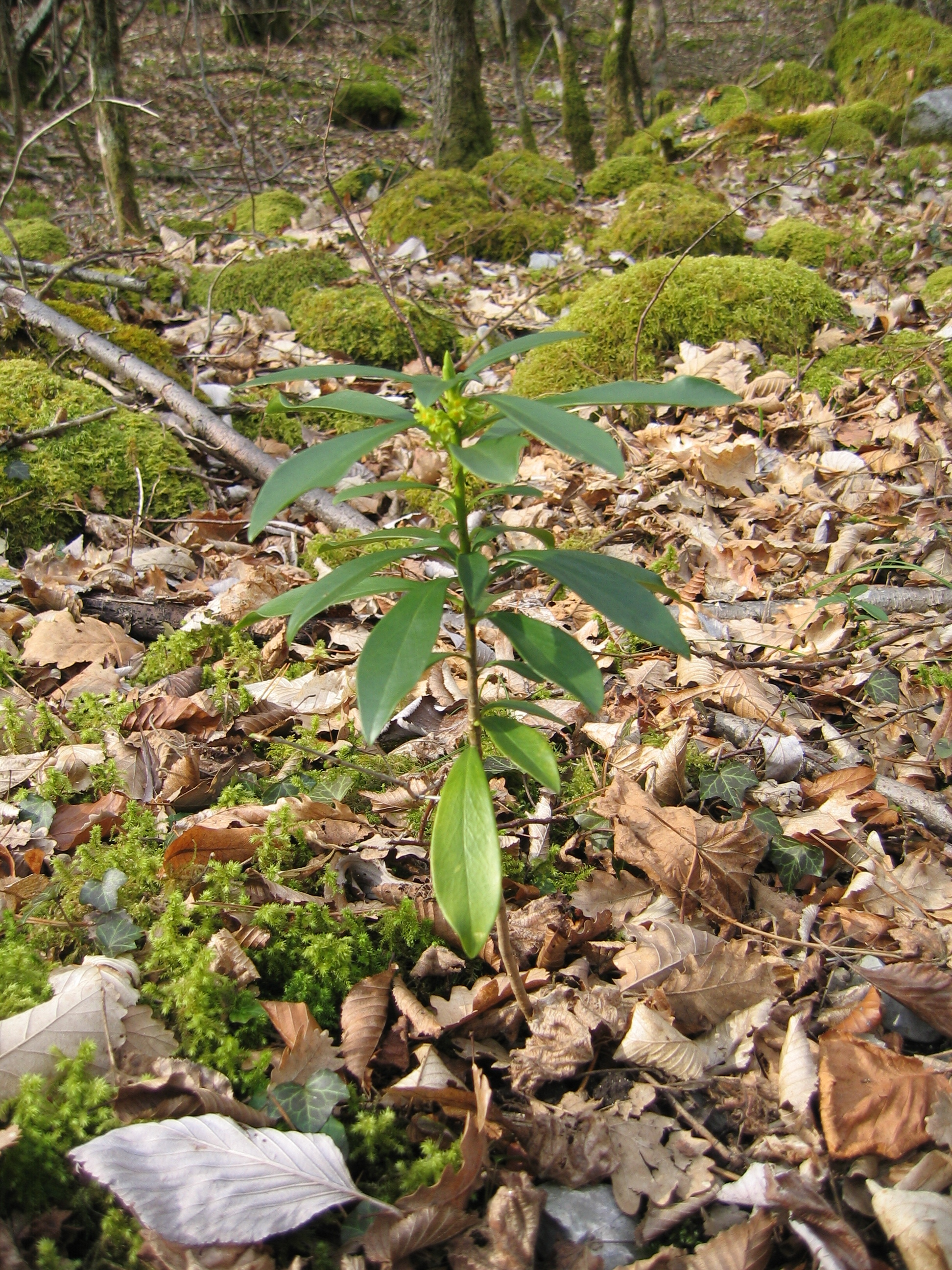 plante combe Dijon